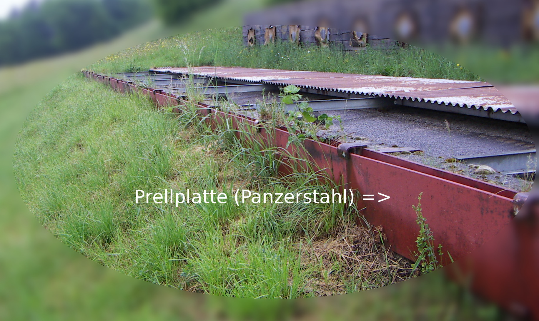 Bild einer Prellplatte an einem 300m-Scheibenstand